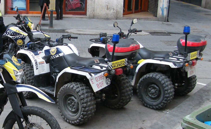 Quads are in use with Valencia Municipal Police for patrolling narrow old-town streets.